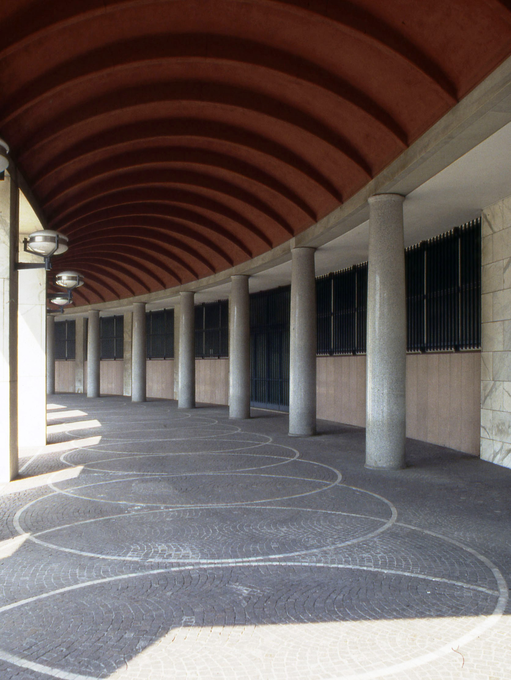 Porticato del palazzo INPS